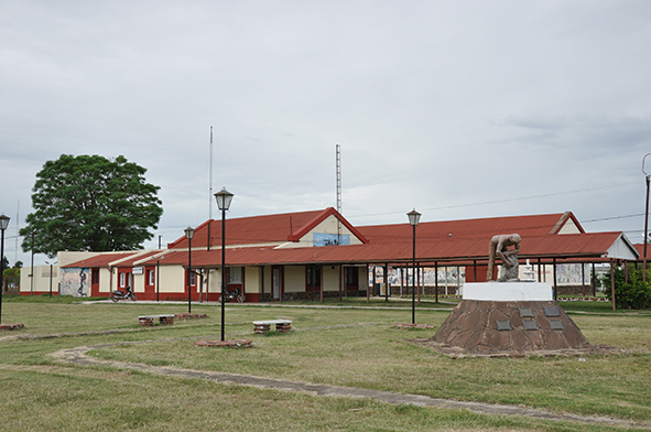 antigua terminal de trenes